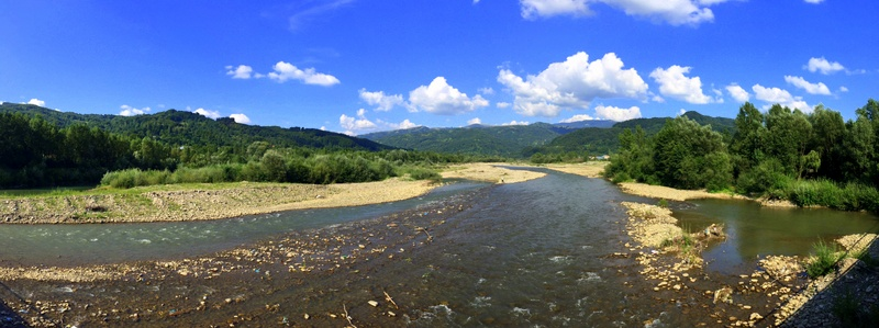 Річка Тересва. Вигляд з мосту